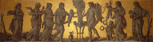 Десюдепорт из Золотого зала Белого домика в Никольском-Урюпине.